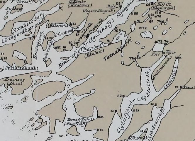 Carte marquant l'emplacement des vestiges archéologiques de Vatnahverfi mis au jour à la fin du XIXe.